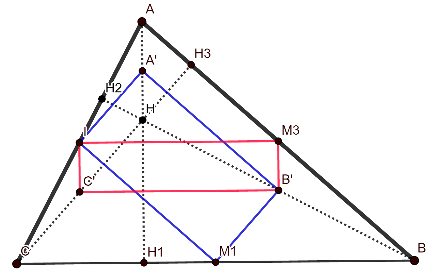 Но картинці зображено доведення теореми про Коло Ейлера